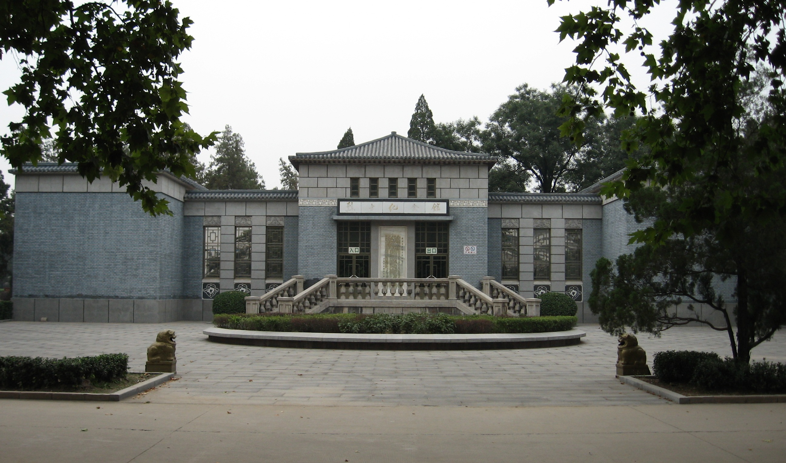 中国河北石家庄华北军区烈士陵园烈士纪念馆。